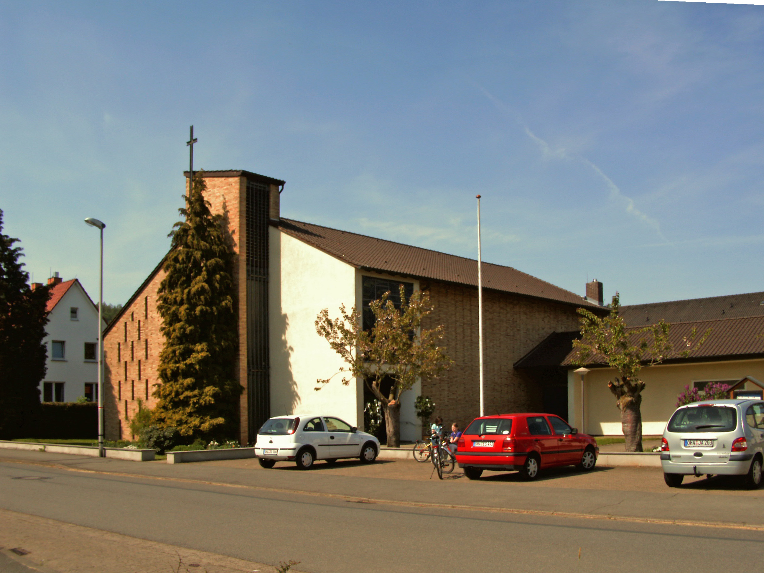 Katholische Kirche St. Hildegard in Hattorf am Harz, Landkreis Osterode